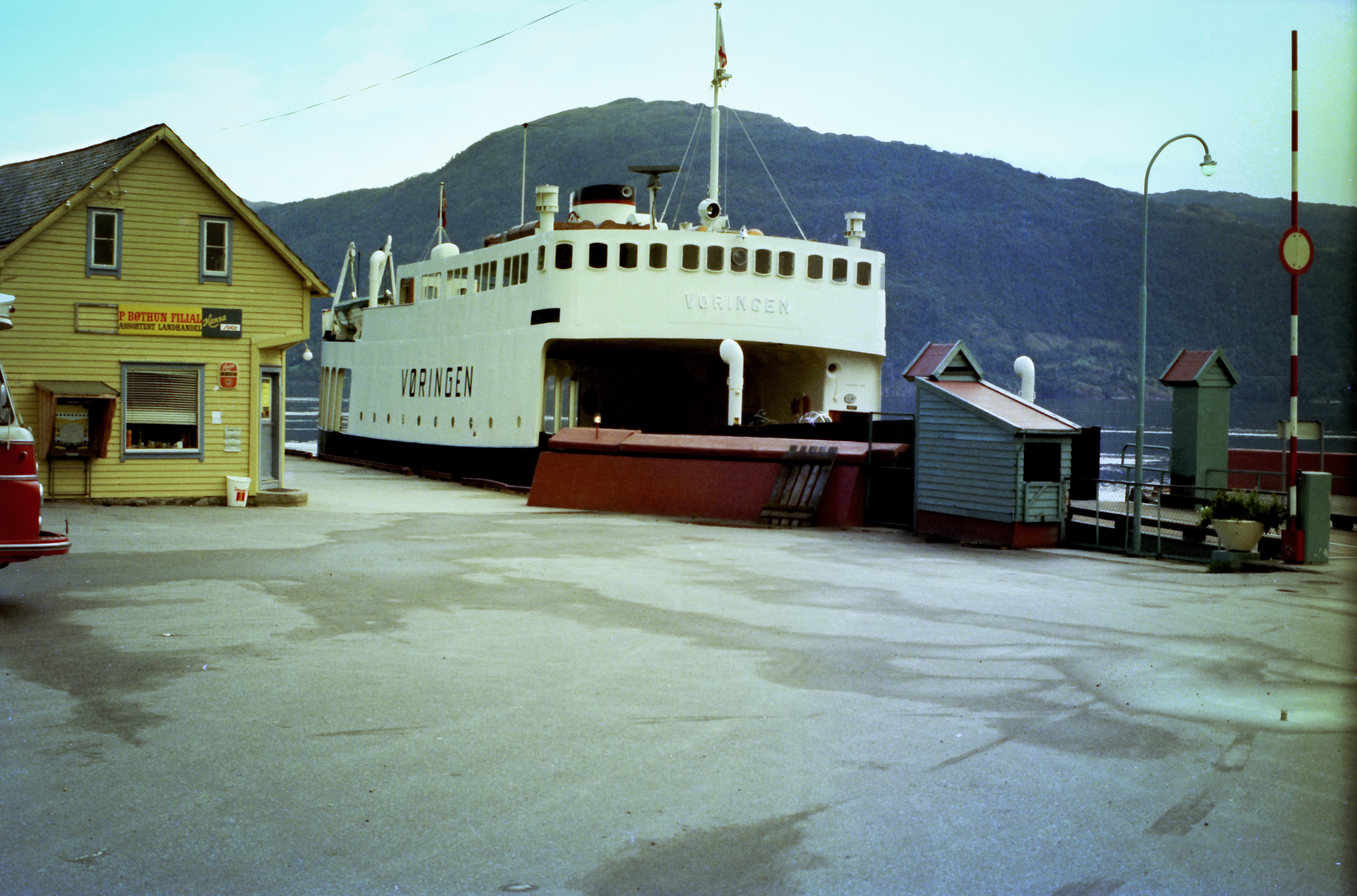 M/F Hardangerfjord built 1953.